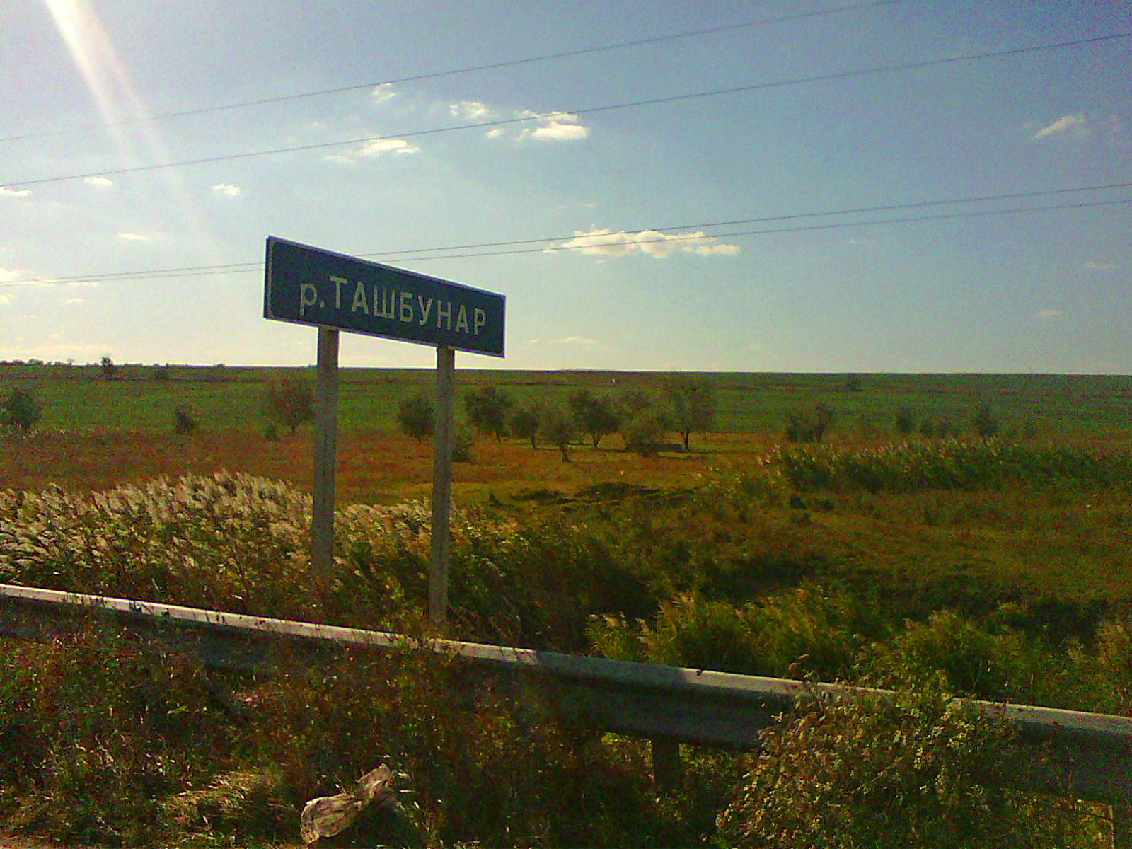 Річка Ташбунар в Ізмаїльському районі Одеської області